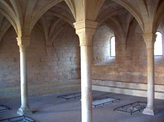 Interior de la sala capitular del Monasterio de Santes Creus